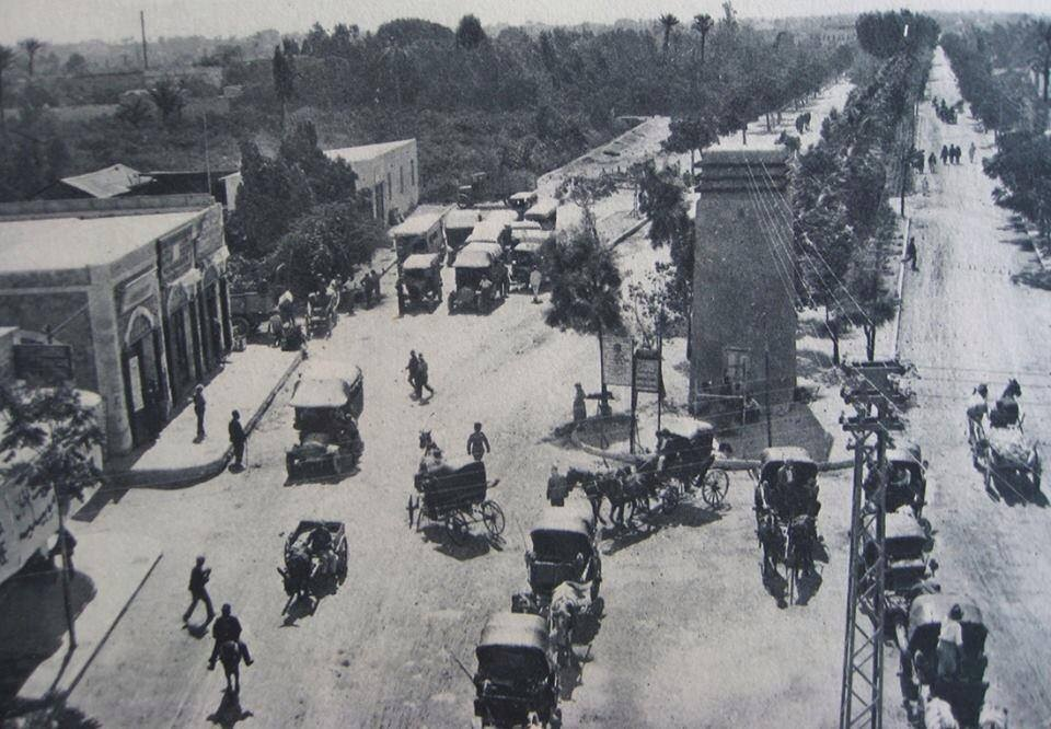 השנאי ההיסטורי בתחילת שדרות ירושלים ביפו. תצלום מסוף שנות ה-20